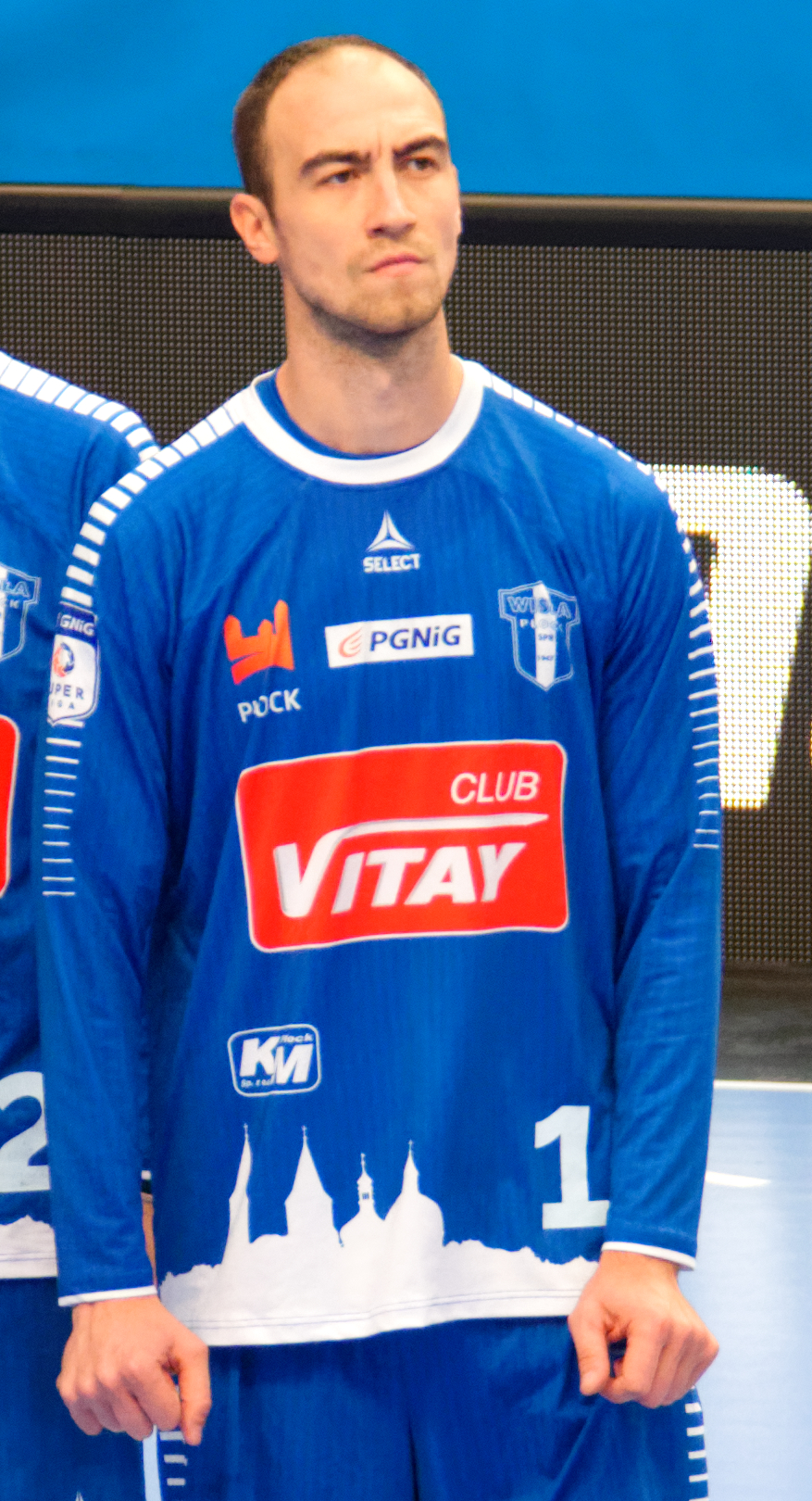 Rencontre de phase de groupe de la Ligue des champions 2016-17. A Coubertin, le 2 octobre 2016.